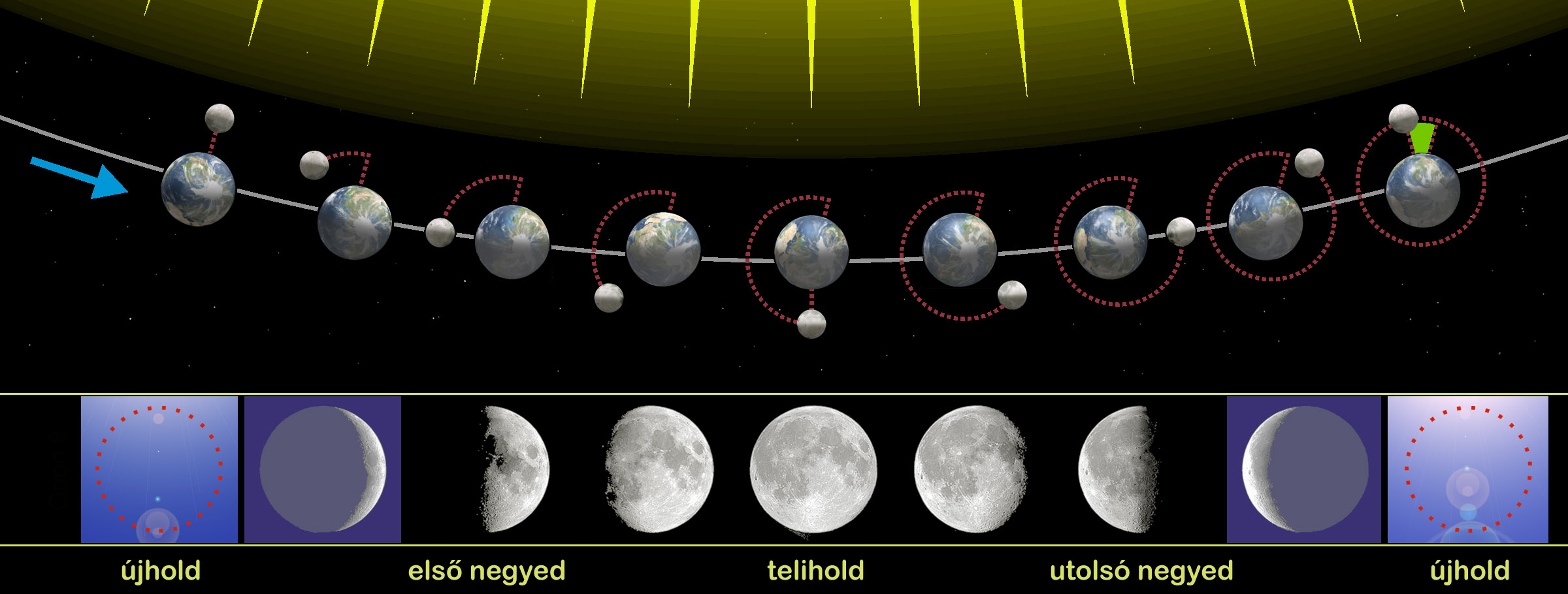 A Hold fázisainak kapcsolata a Föld körüli keringésével. A Föld és a Hold méretei és távolságuk erősen torzított. Az ábrán a következő további jelenségek figyelhetők meg: a Hold kötött keringése, a Föld mozgása a közös tömegközéppont körül, a sziderikus és szinodikus hónap eltérése (zöld jelzés), a Föld tengelyferdesége